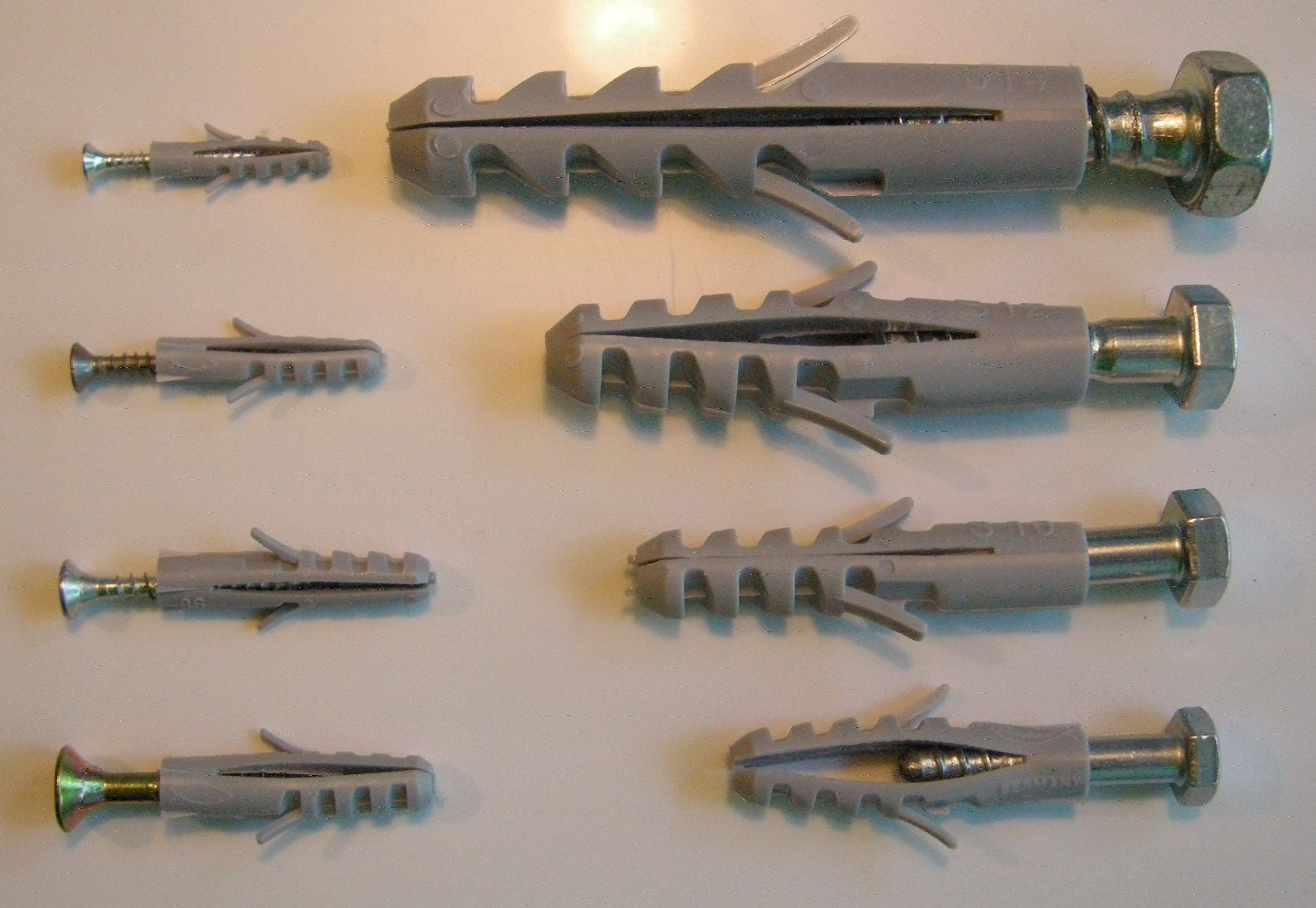 Kunststoffdübel in acht verschiedenen Größen: 4, 5, 6, 7, 8, 10, 12 und 14 mm